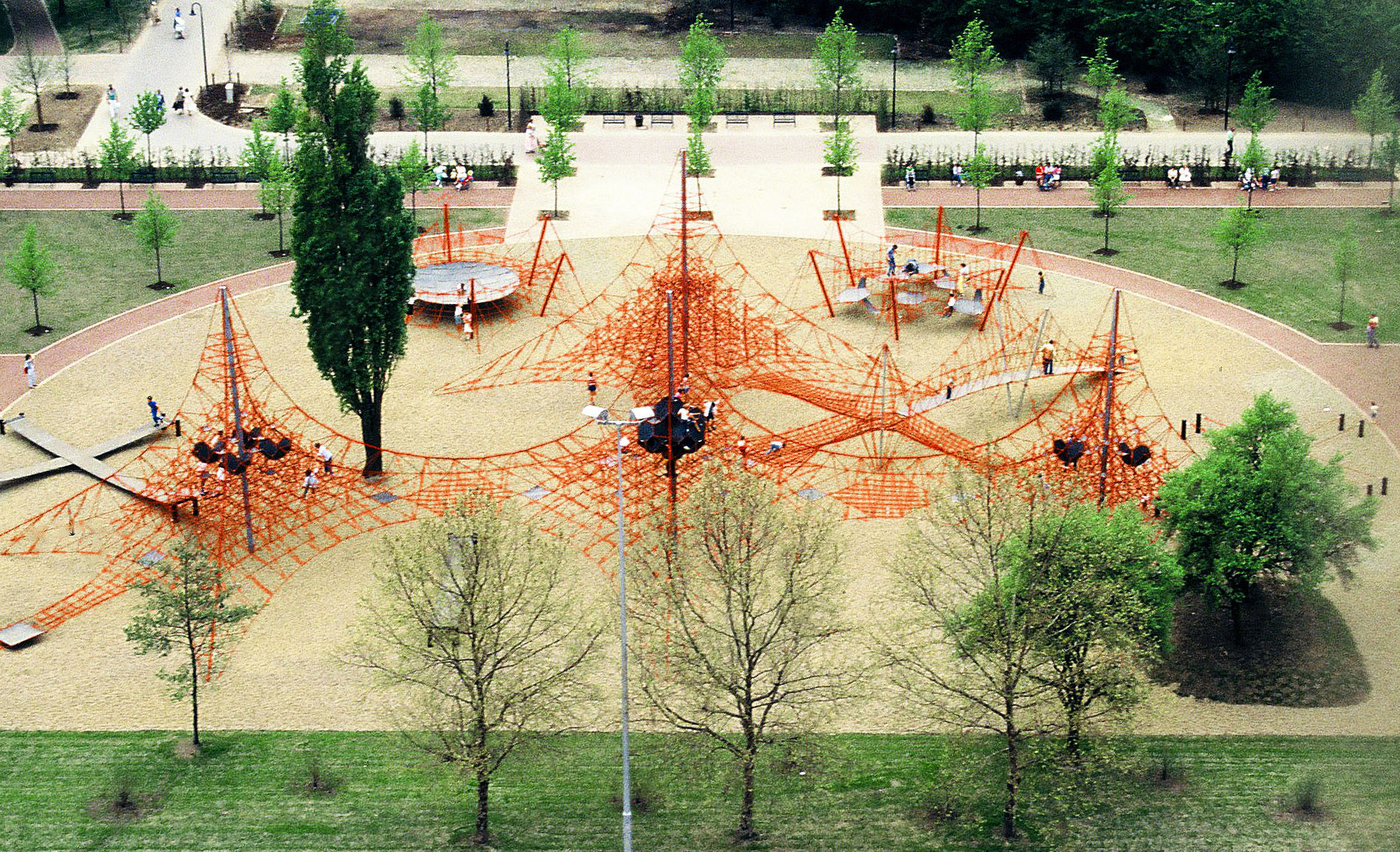 Super-Viermast-Seilzirkus im Südpark Düsseldorf, entworfen von Conrad Roland